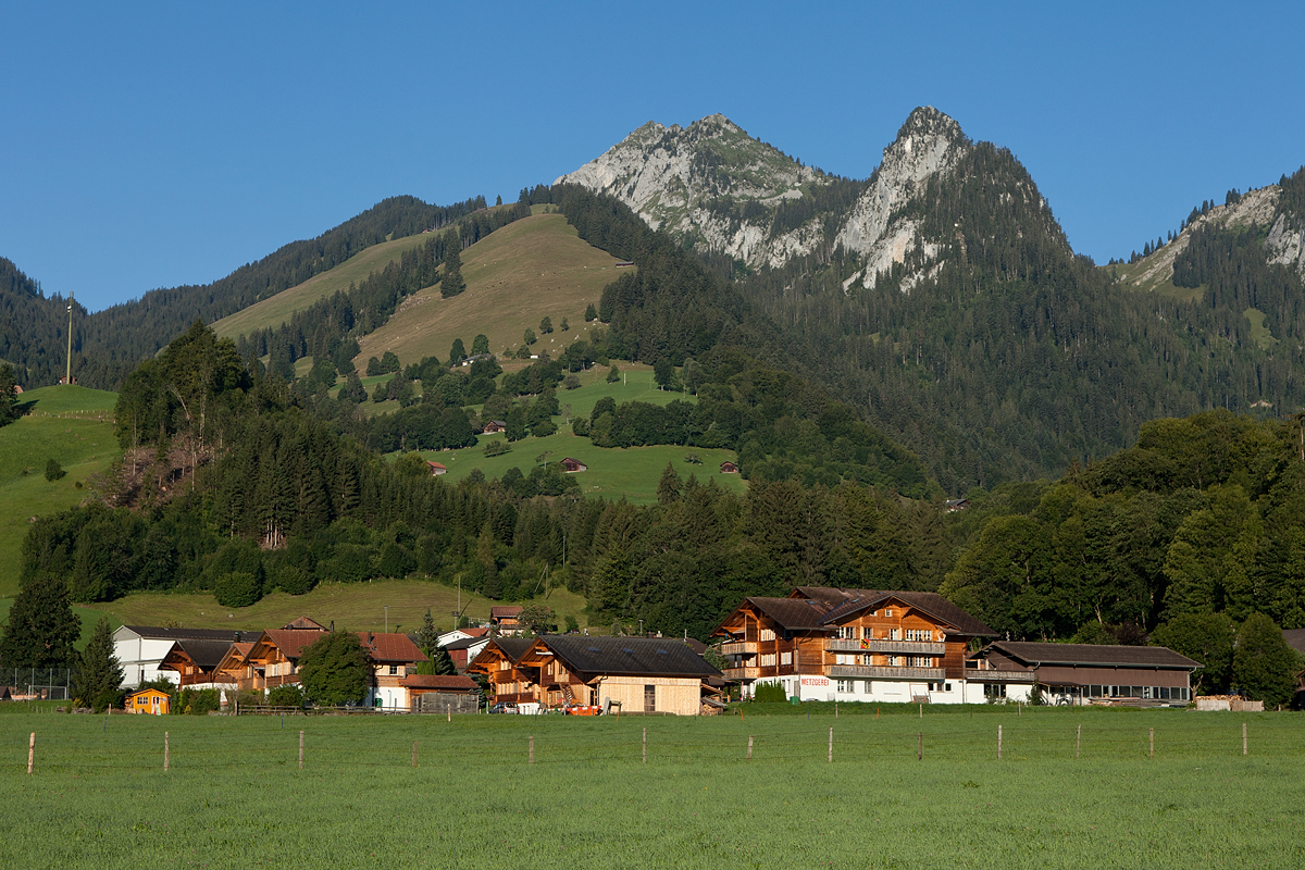 Dorf Reidenbach (Fusspassort, Jaunpass), das zur Gemeinde Boltigen gehört mit Bäderhorn und Dürrifluh